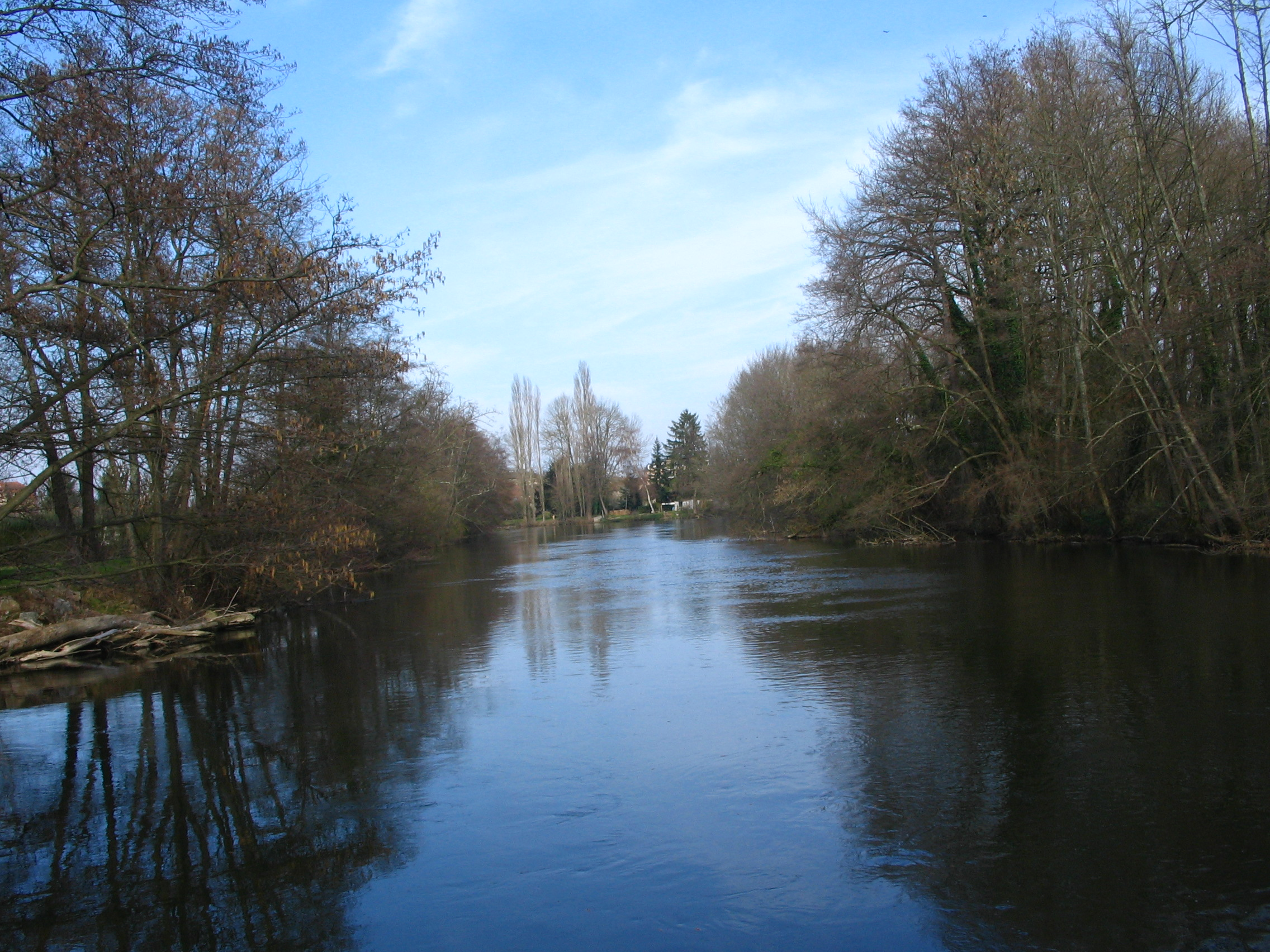 La Sioule au sud de Saint-Pourçain (03).